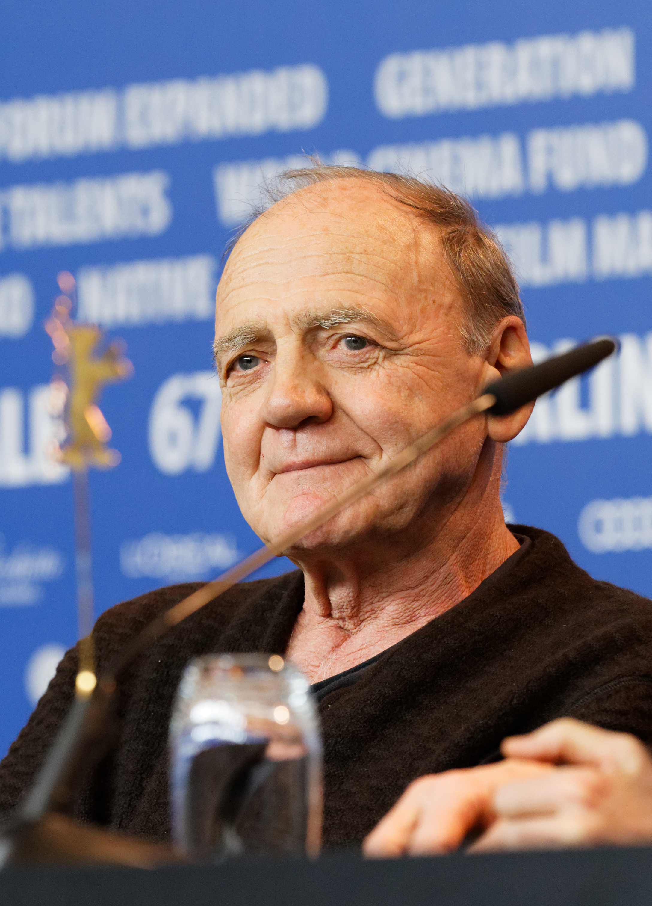 Bruno Ganz bei der Pressekonferenz zu The Party bei der Berlinale 2017